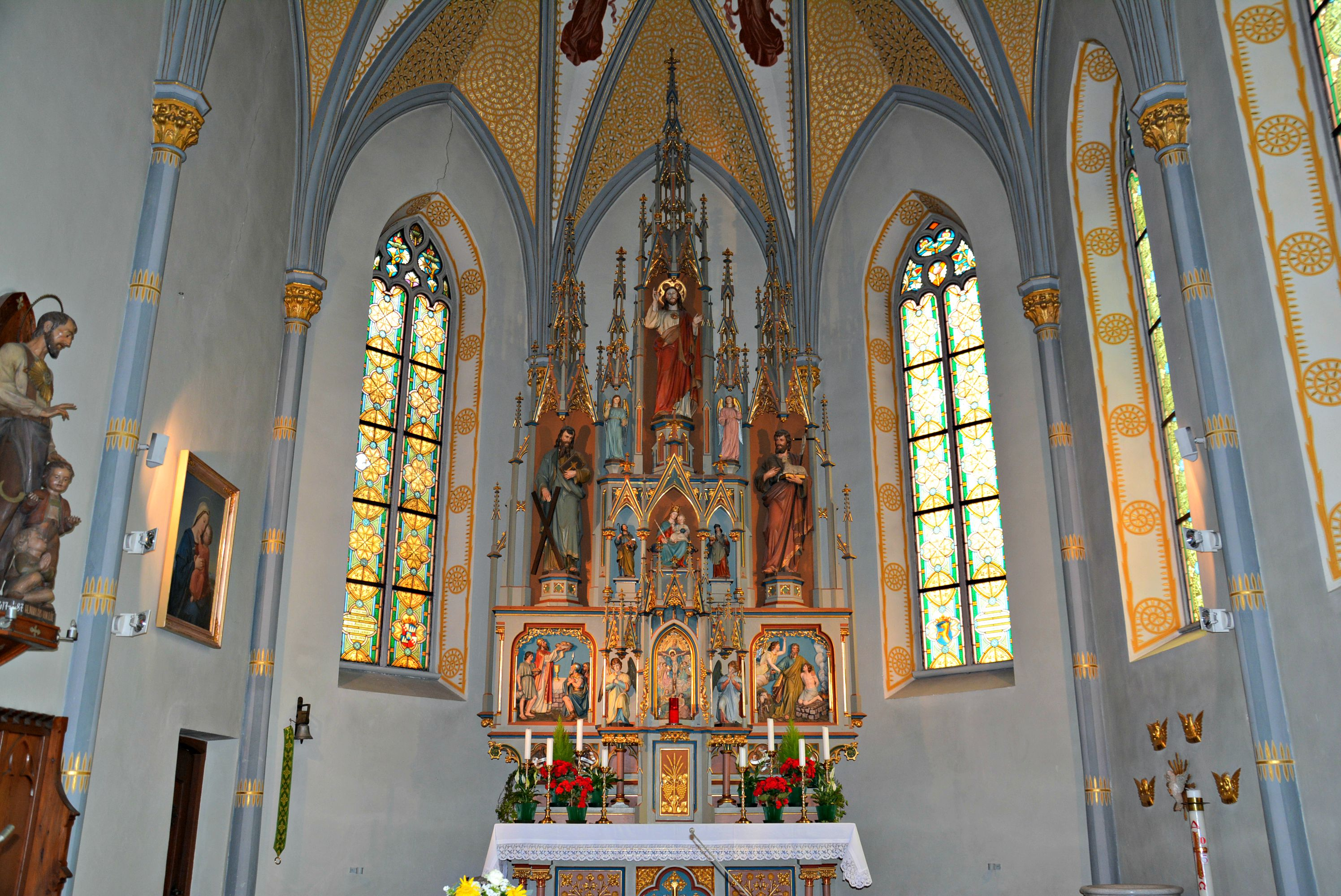 Vedi titolo